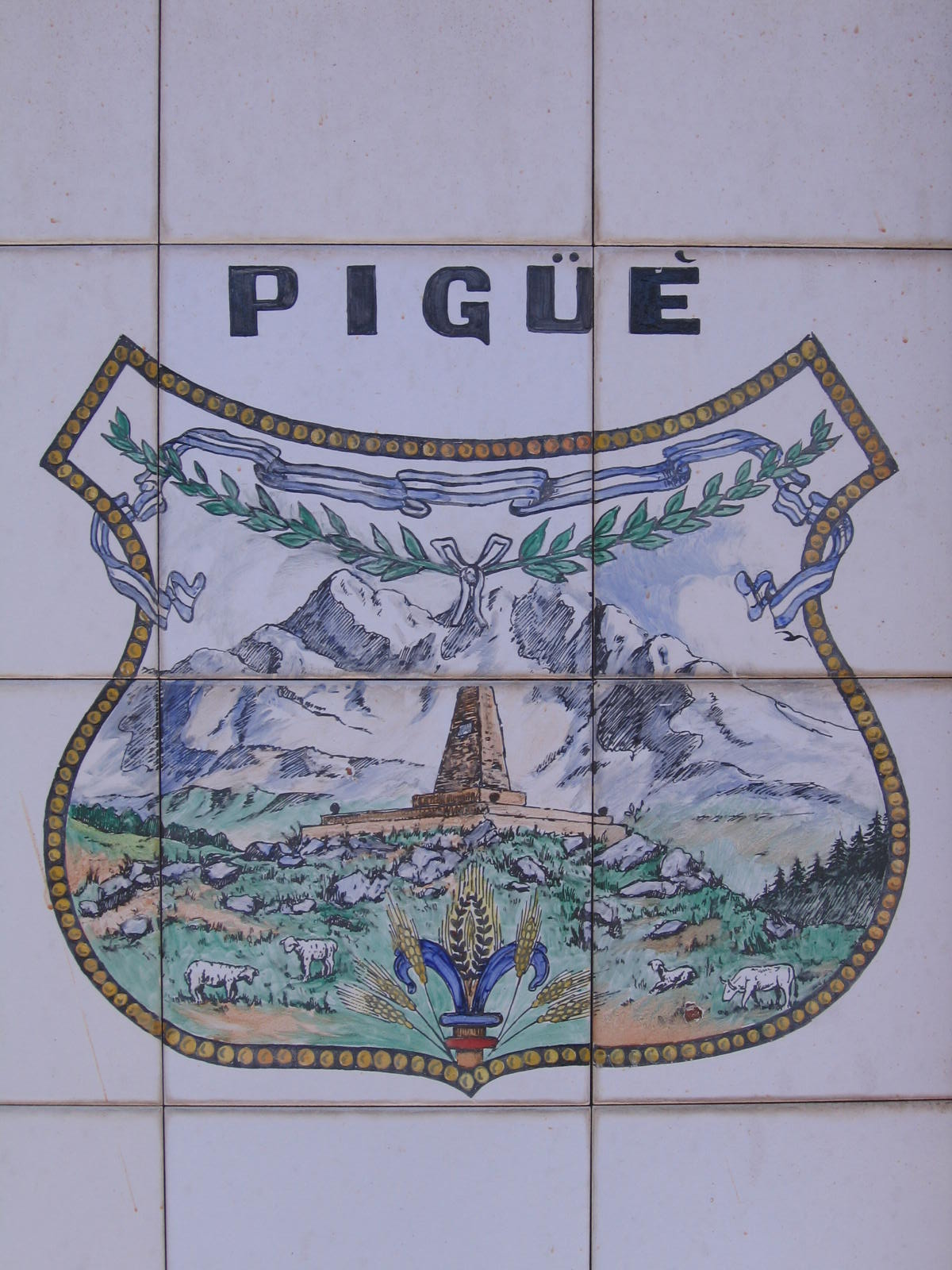 Blason de la villede Pigüé. Argentine, province de Buenos Aires.